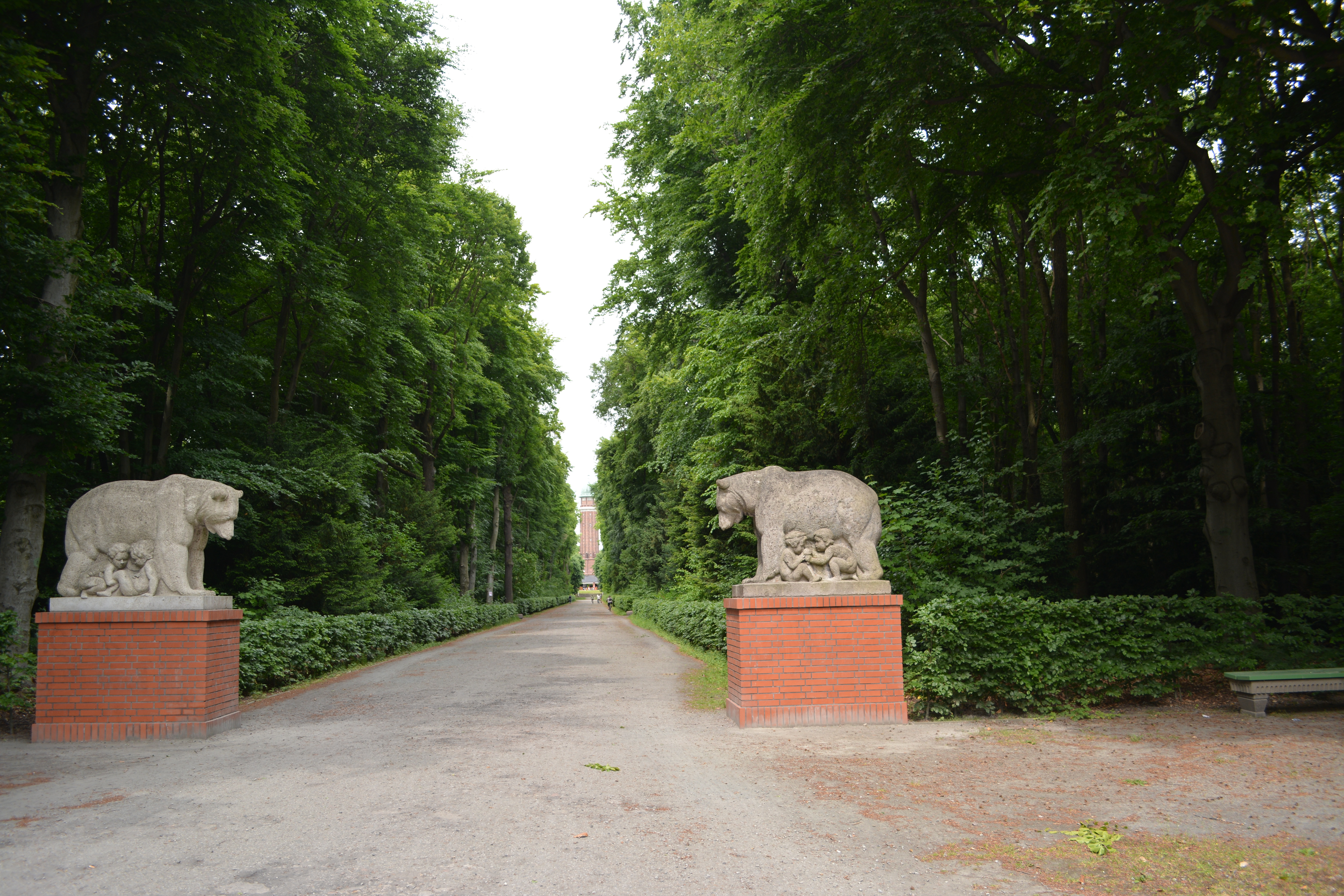 Zwei Bären mit spielenden Kindern, geschaffen aus Muschelkalk vom Bildhauer Hermann Joachim Pagels in den 1920-er Jahren für den denkmalgeschützten Volkspark Jungfernheide in Berlin-Charlottenburg. Der linke Bär war nach dem 2. Weltkrieg verschollen und wurde 2011 nach dem Original neu gestaltet.